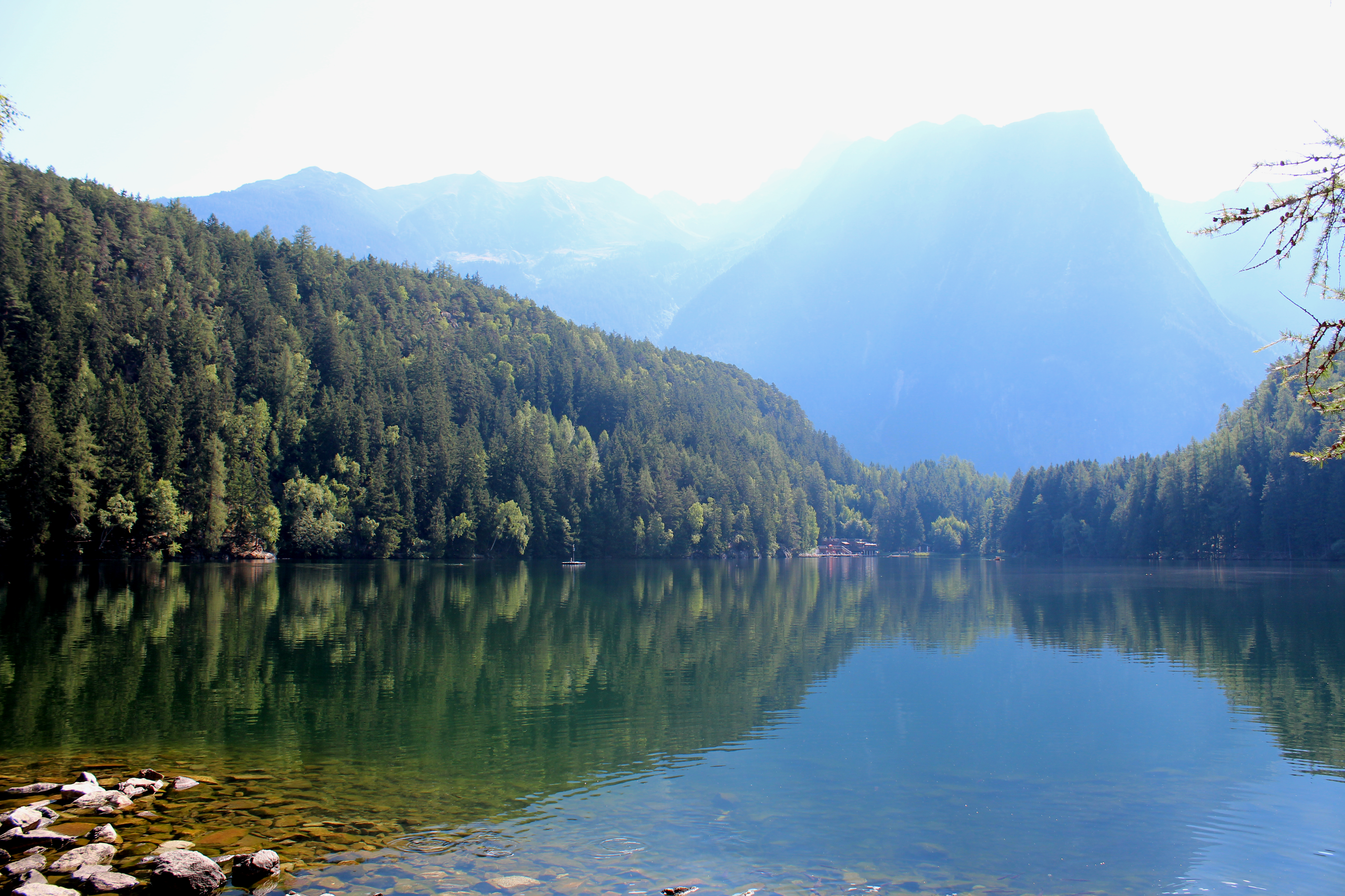 Piburgersee bei Piburg oberhalb von Oetz This media shows the natural monument in the Tyrol with the ID ND_2_2.